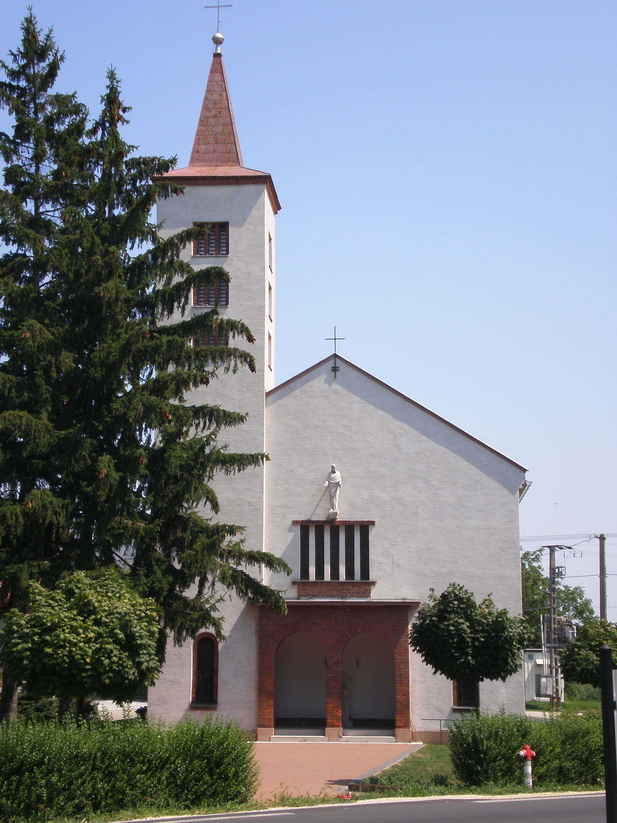 Római katolikus templom (Győrújfalu, Győr-Moson-Sopron megye, Magyarország)